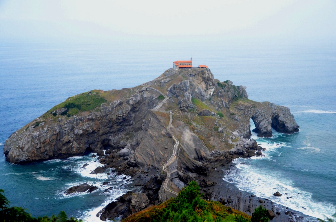 Вид на остров со смотровой площадки